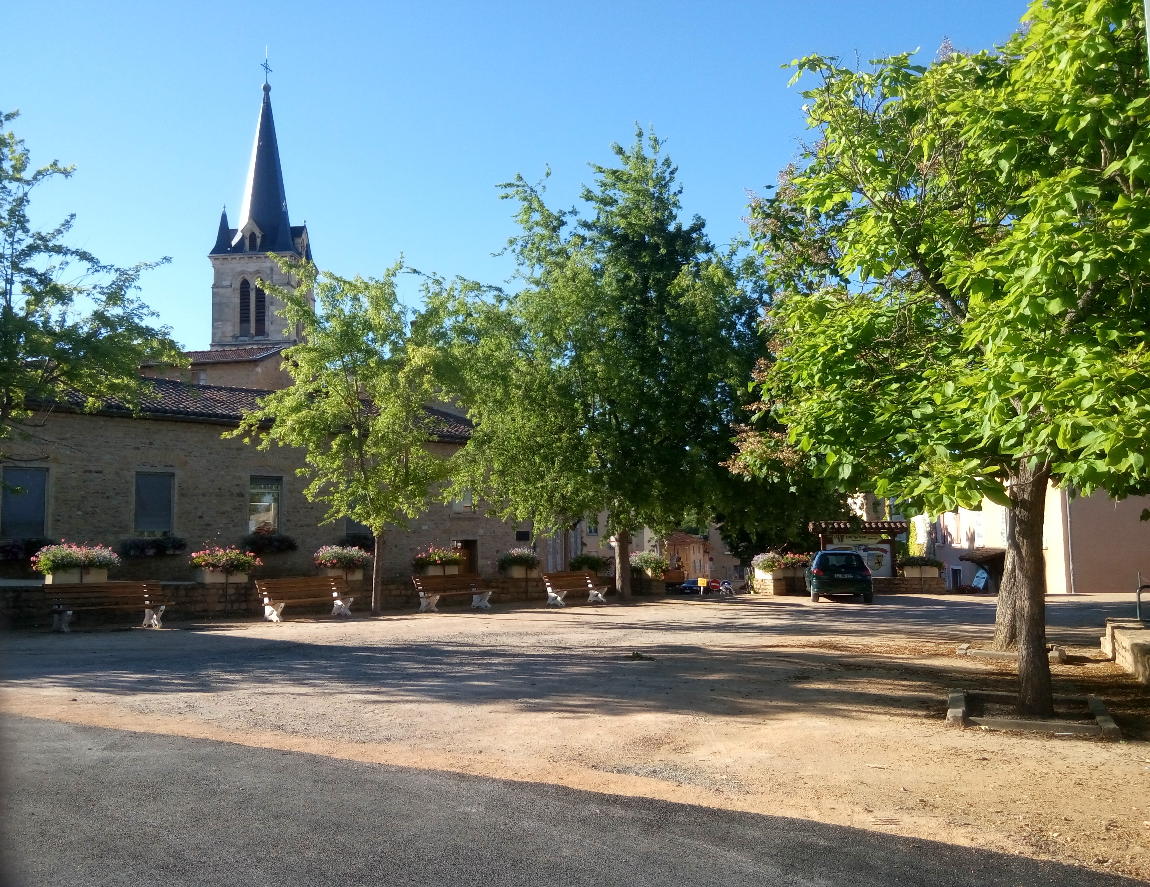 Place du village à Denicé, dans le département du Rhône.